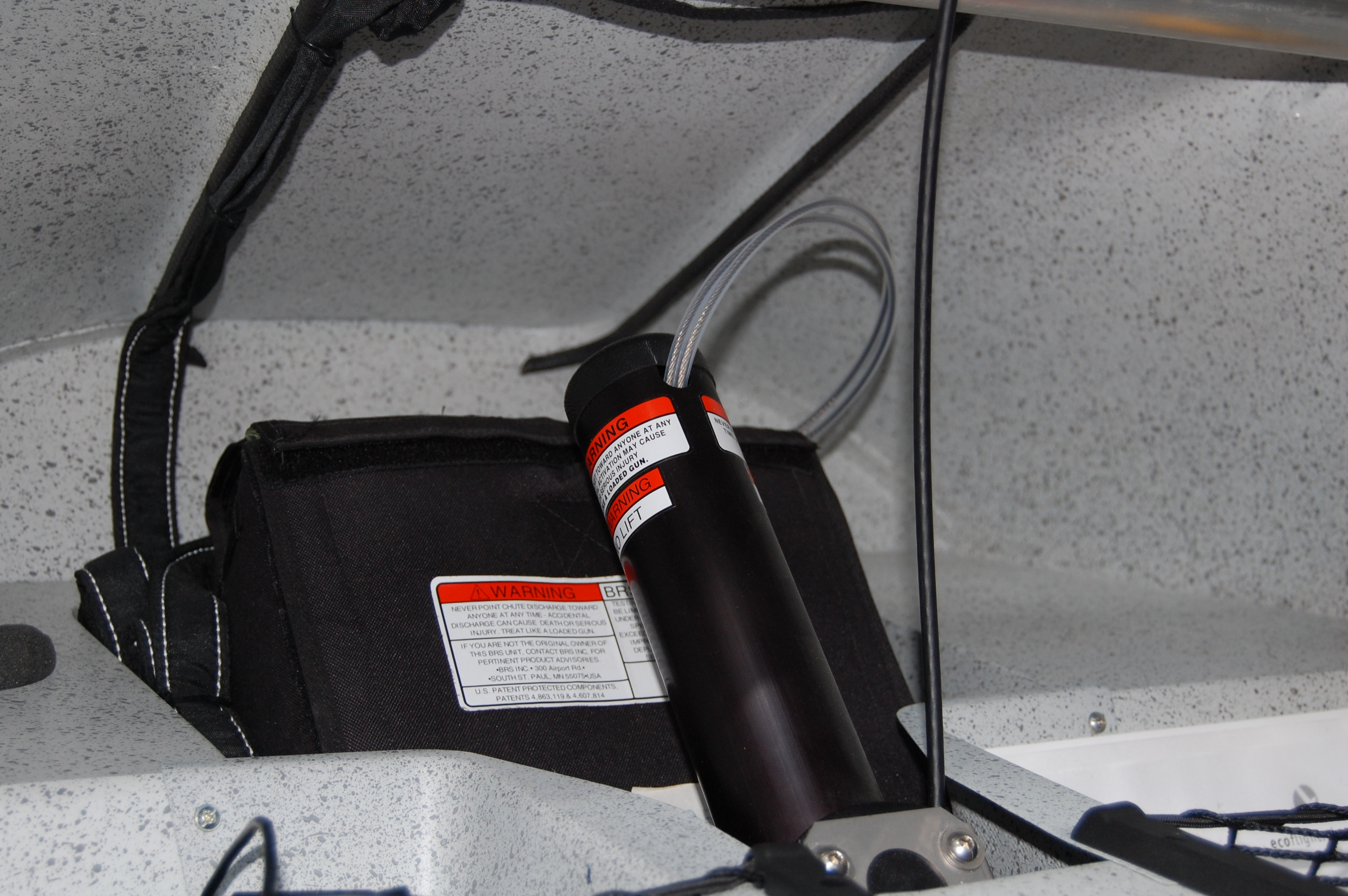 Gesamtrettungssystem mit Rakete und zusammengefaltenem Fallschirm